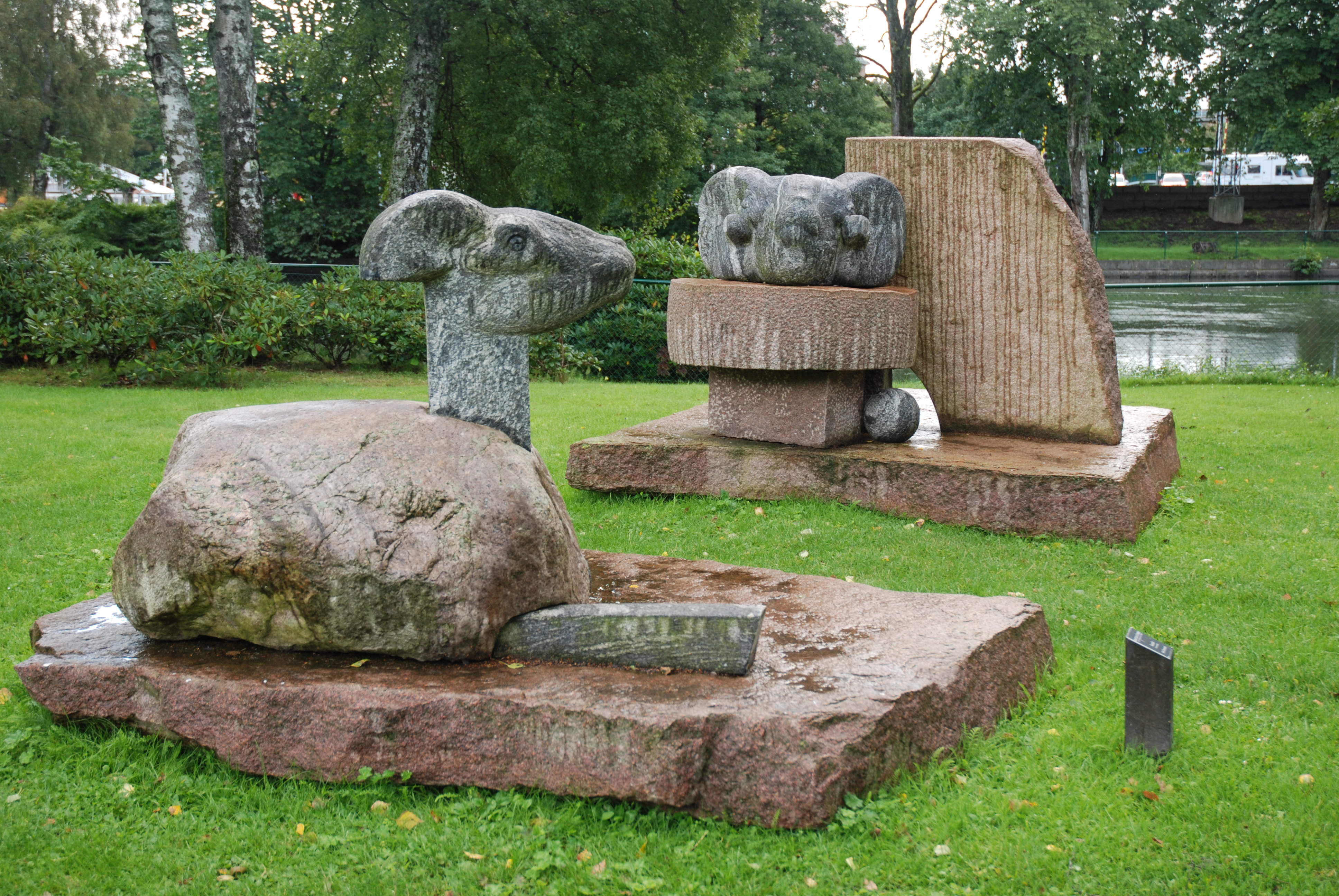 Gutefår by sculptor Erik Åkerlund, Trollhättan Sweden